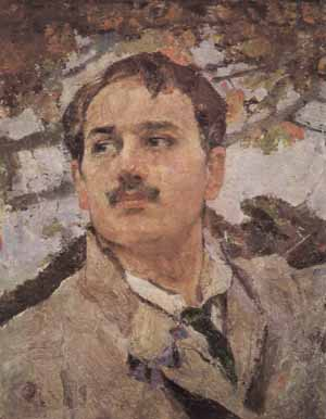 «Автопортрет»